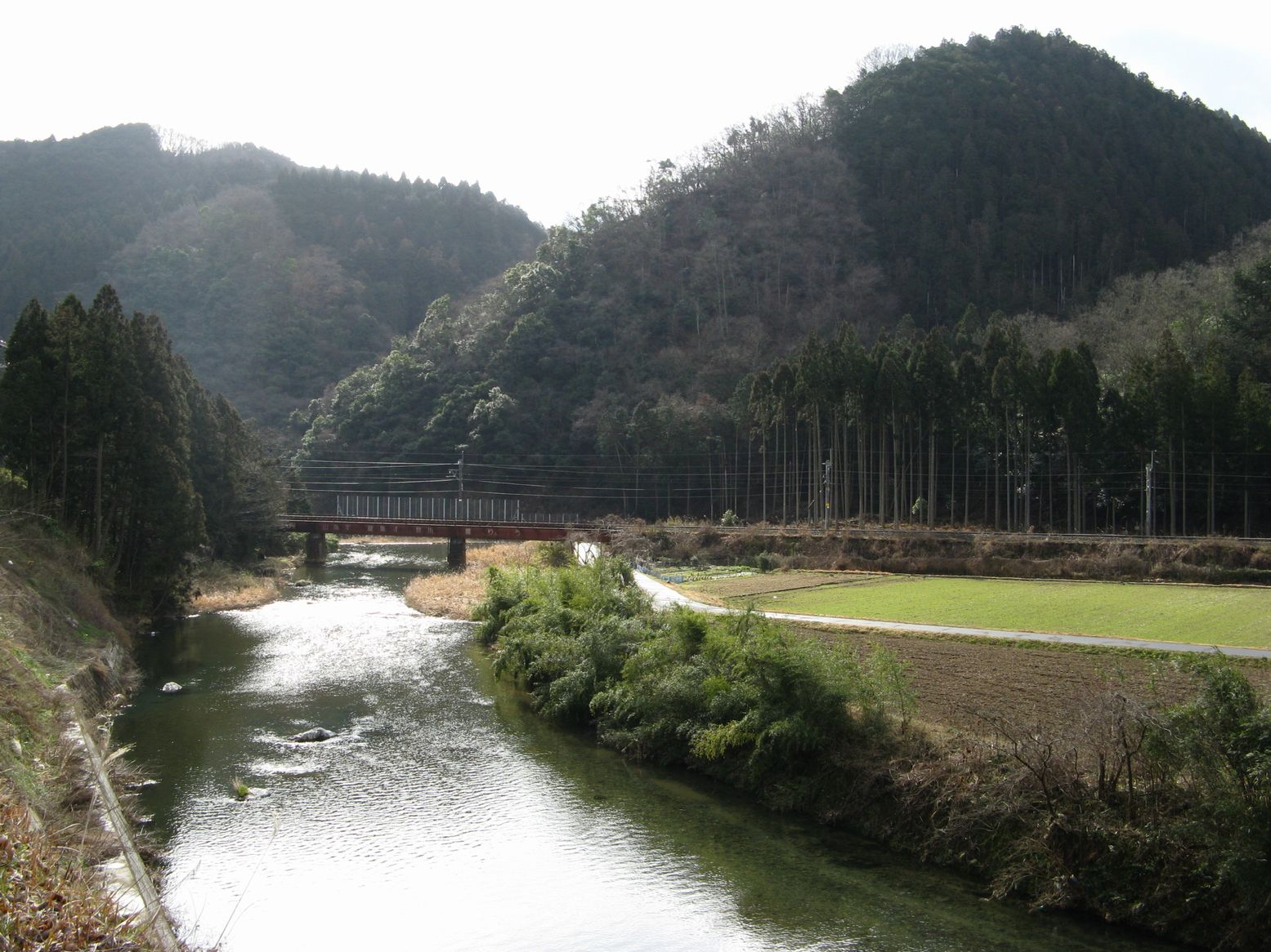 牧川 福知山市夜久野町日置 山陰本線牧川第4橋りょう付近